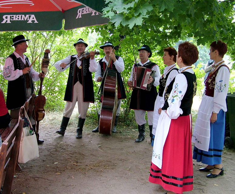 Kaszubski Park Etnograficzny we Wdzydzach Kiszewskich - grupa muzykantów w ludowych strojach kaszubskich.